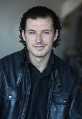 Paco Boublard, acteur français.